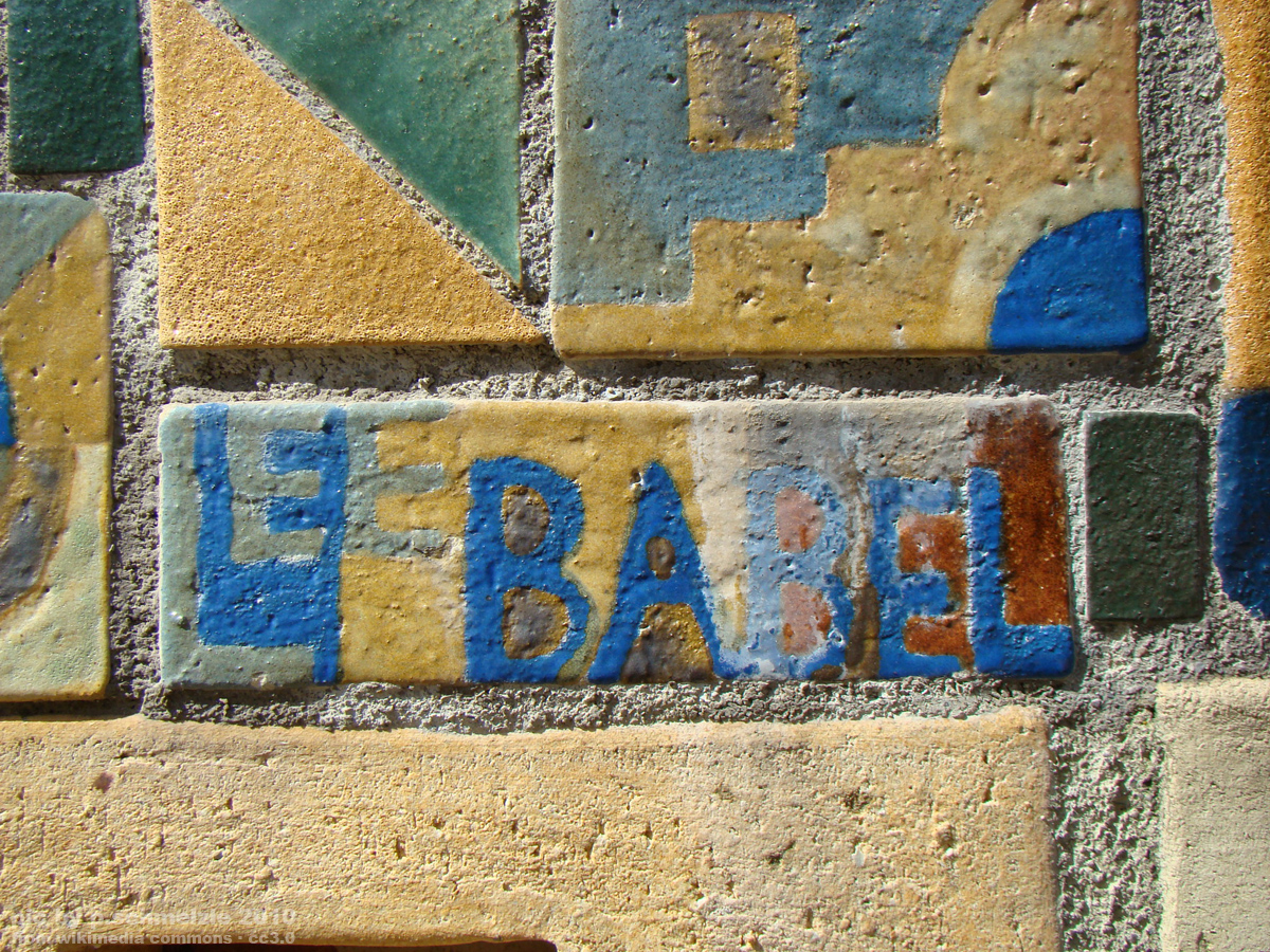 Künstlersignatur von Lee Babel an einer Keramikarbeit an der Ecke Wartberg-/Sichererstraße in Heilbronn